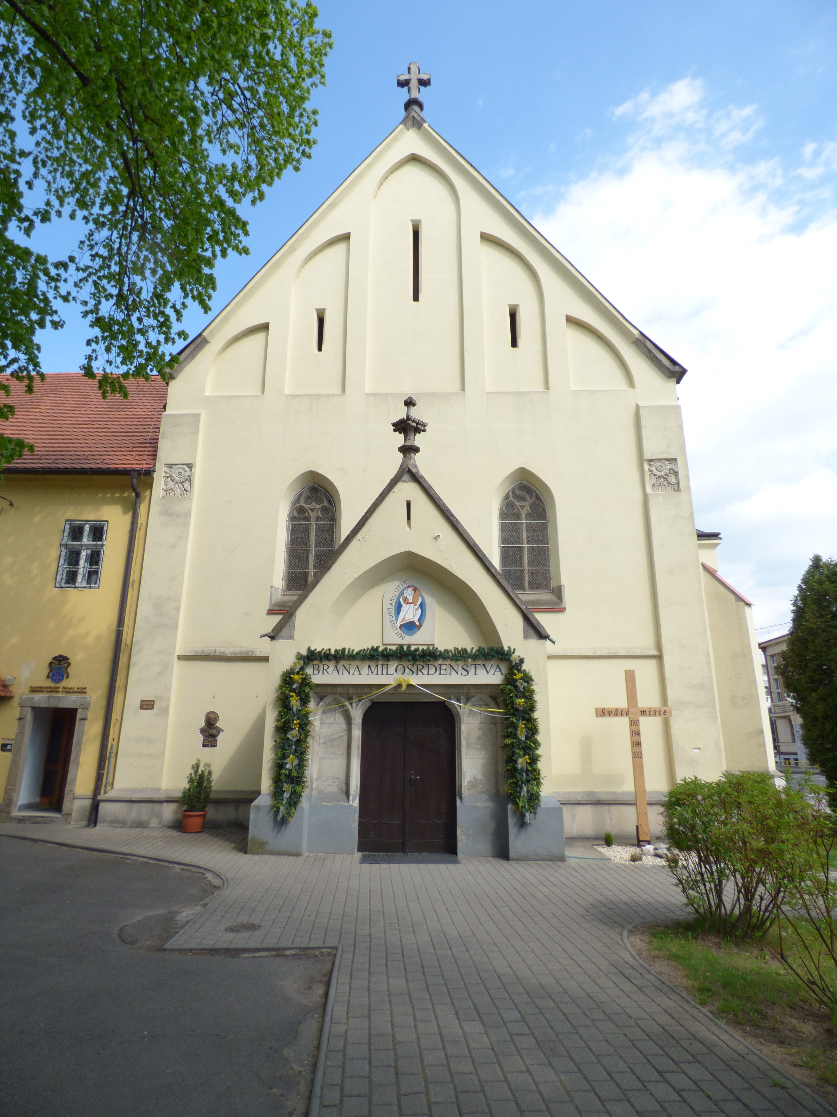 Západná strana kostola